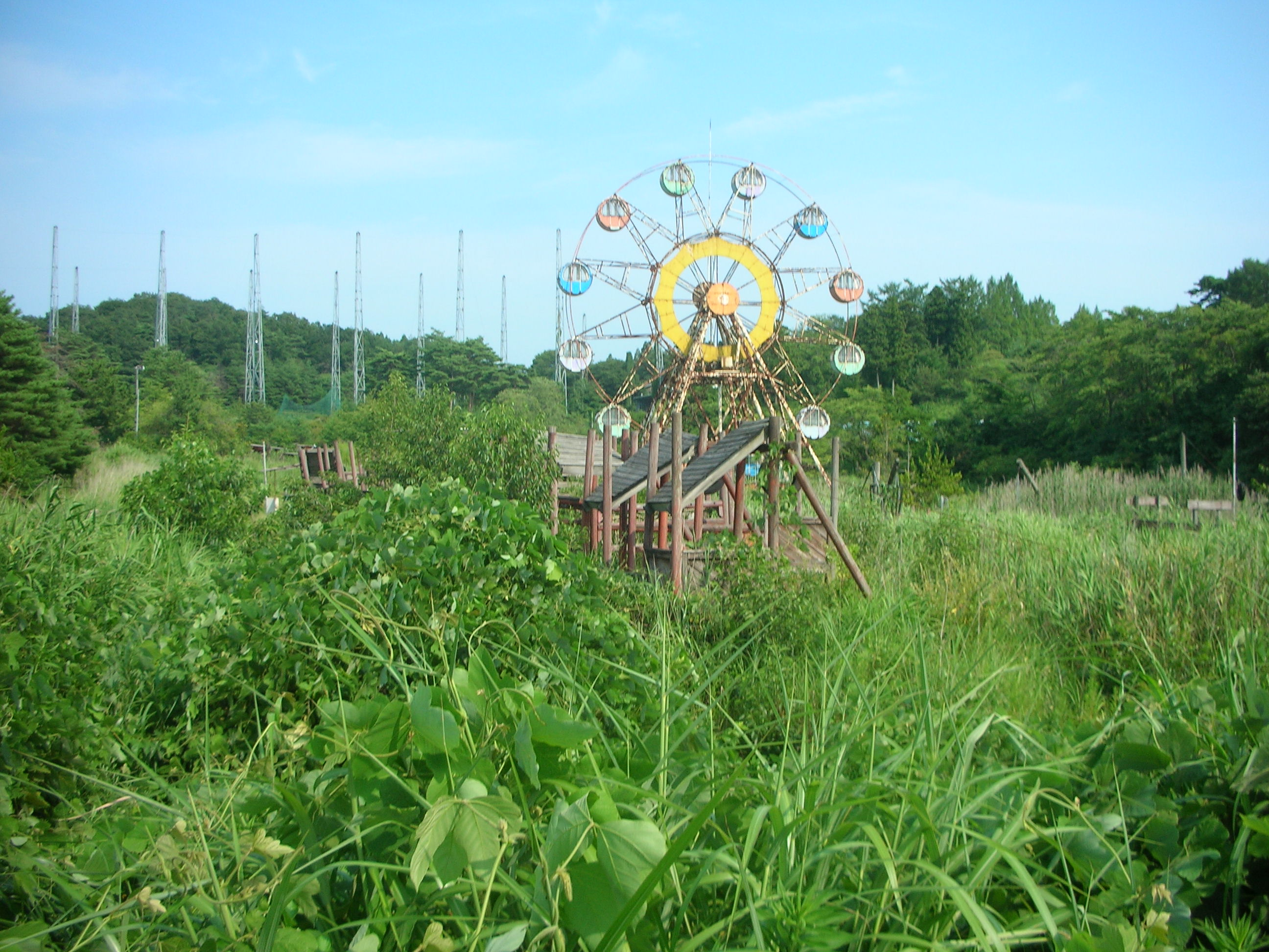 現在の状態